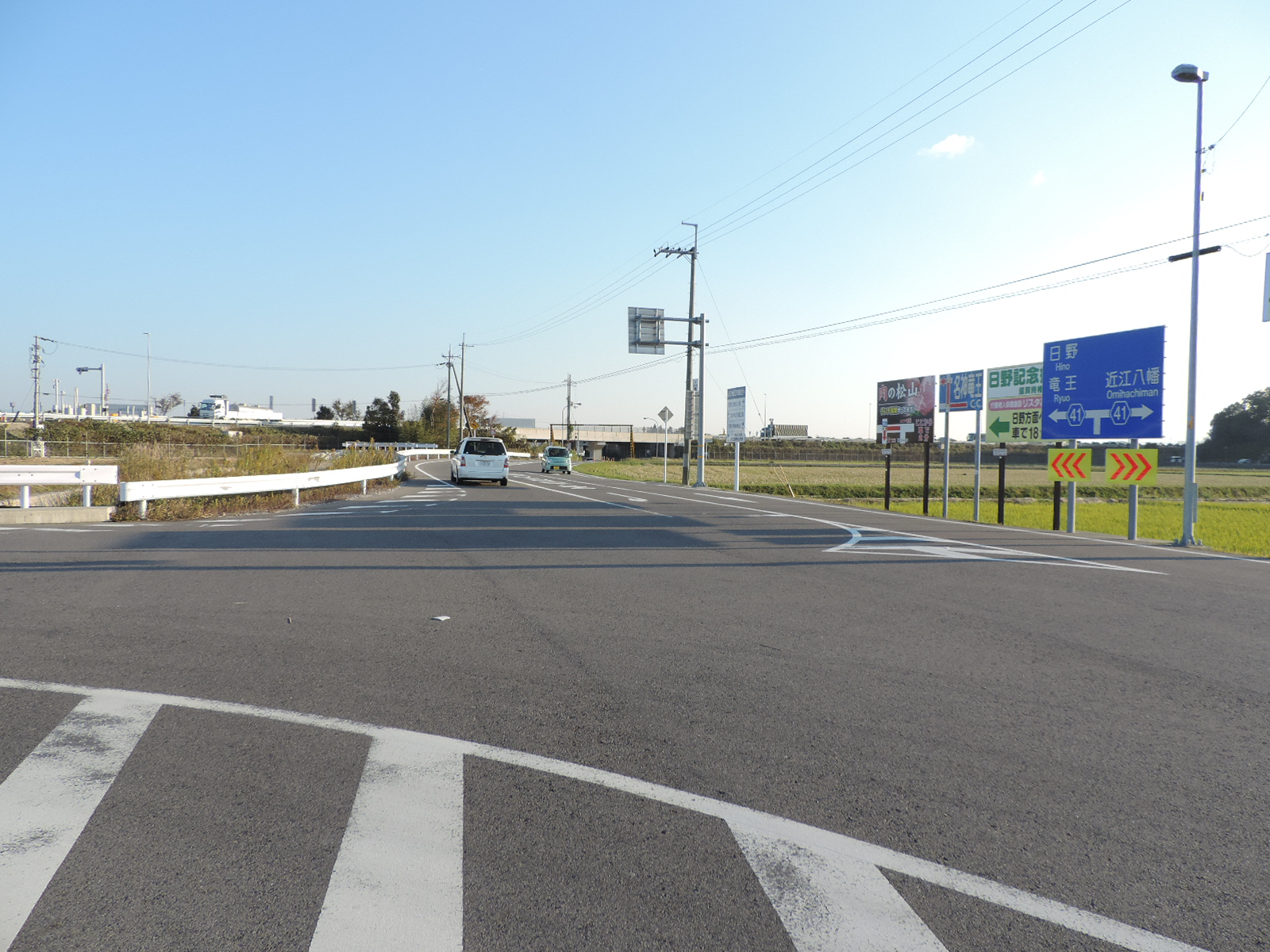 蒲生スマートインターチェンジ付近での滋賀県道41号土山蒲生近江八幡線（滋賀県東近江市：2017年撮影）